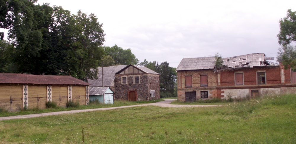 Gruzdzių dvaro rytinei vartai